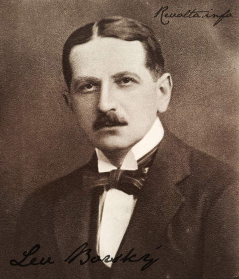 Lev Borský (1883 - 1944), Český novinář a politik.